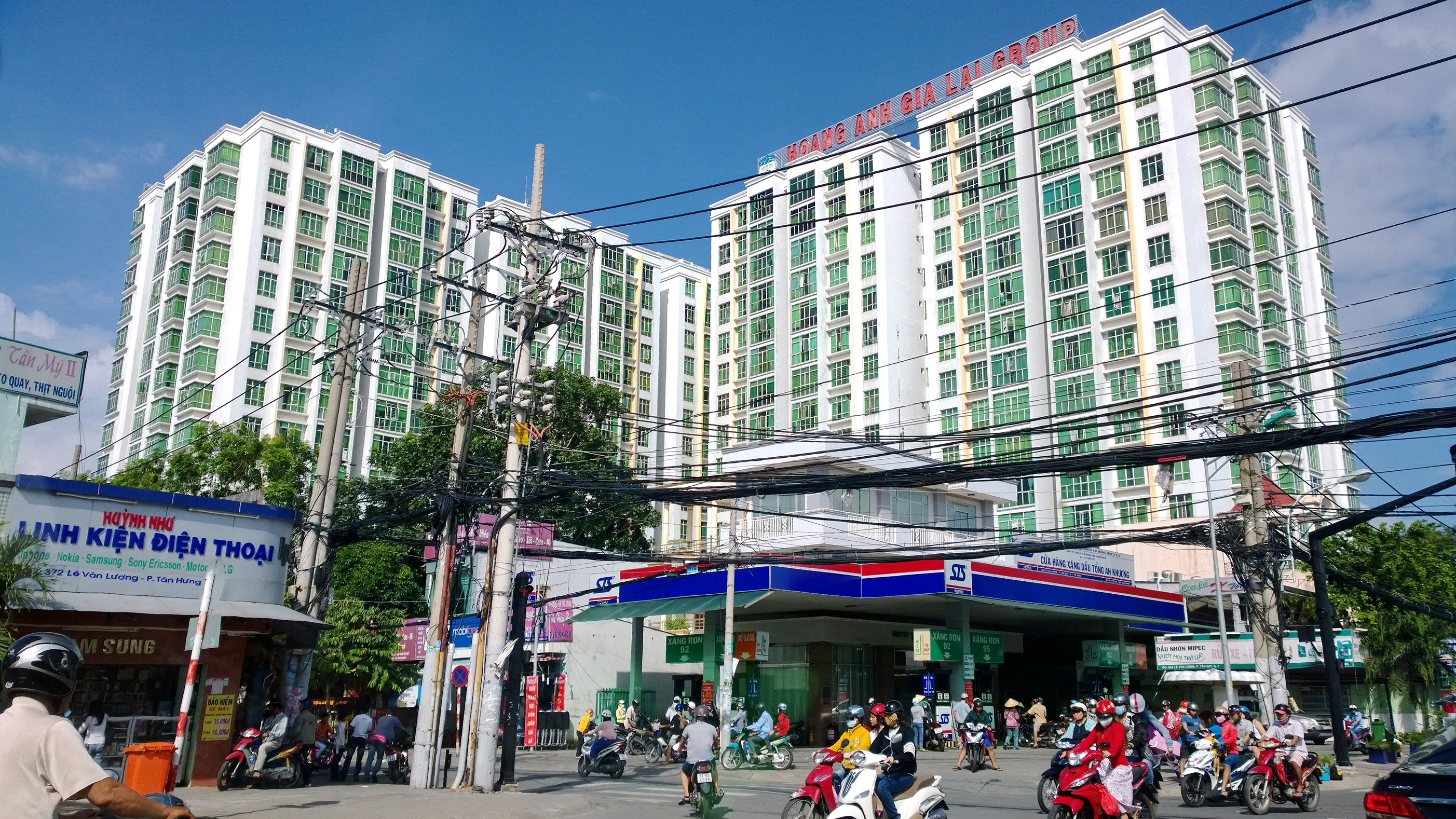 Chung cu Hoang anh gia lai, tan quy, quan 7, tp Ho Chi Minh, Vietnam